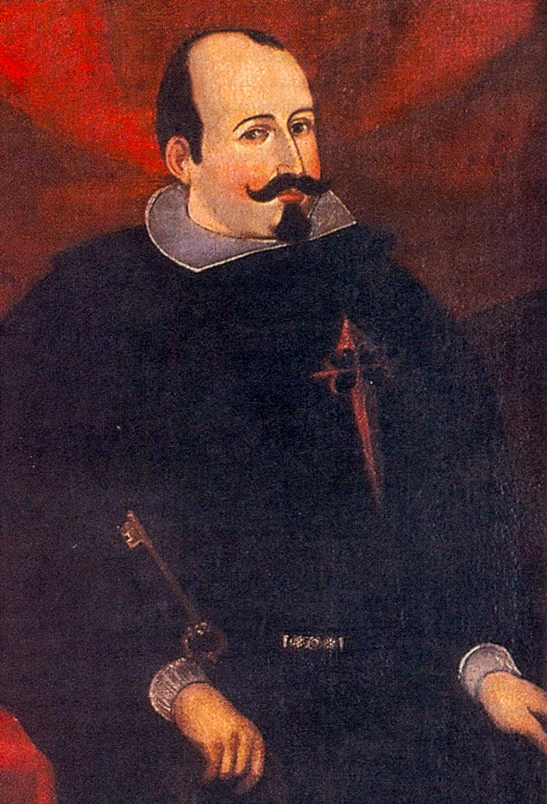 Luis Jerónimo Fernández de Cabrera y Bobadilla (1589-1647), Conde de Chinchón y Virrey del Perú